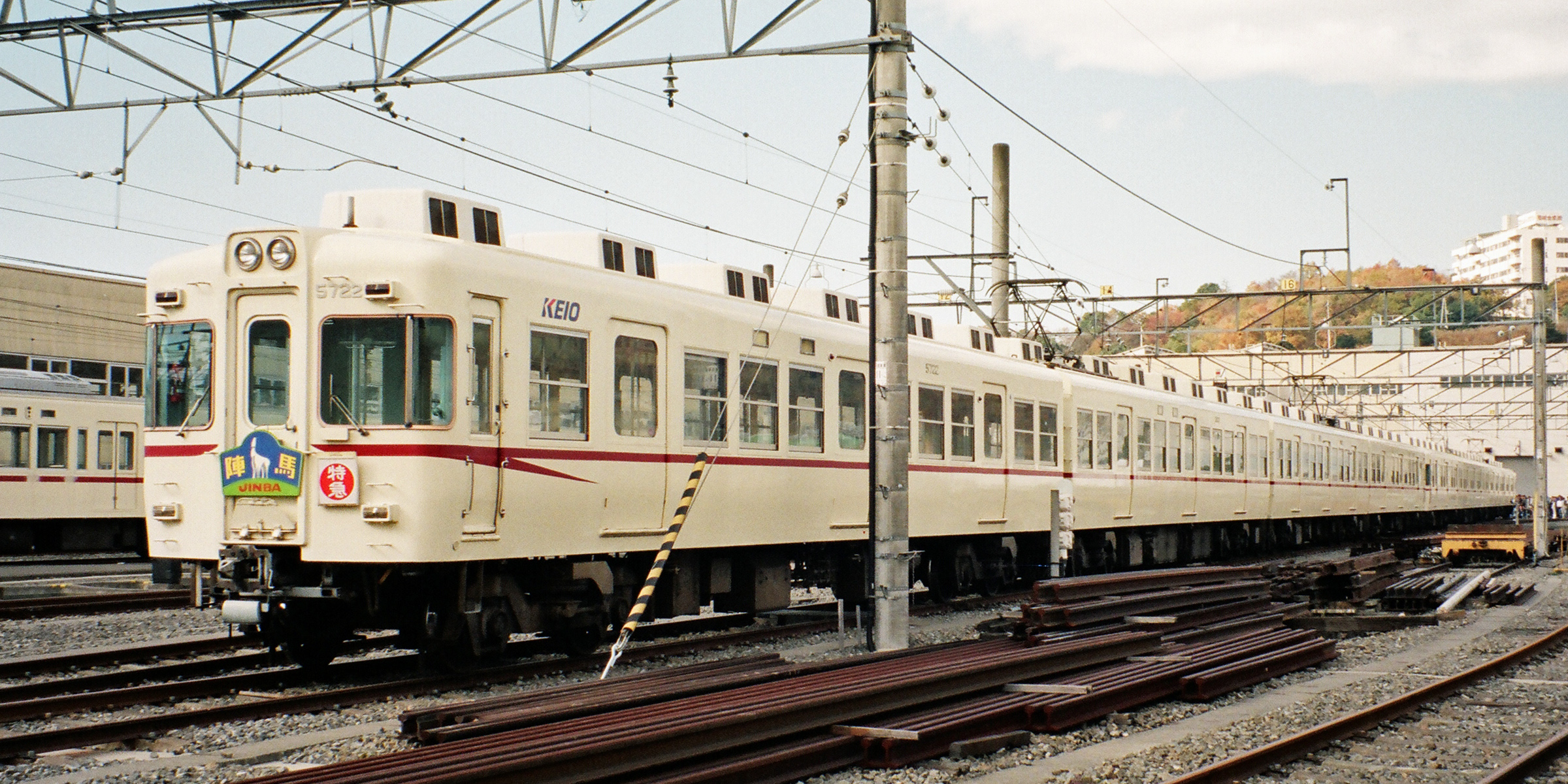 京王5000系電車 さよならイベント時（1996年12月1日撮影）